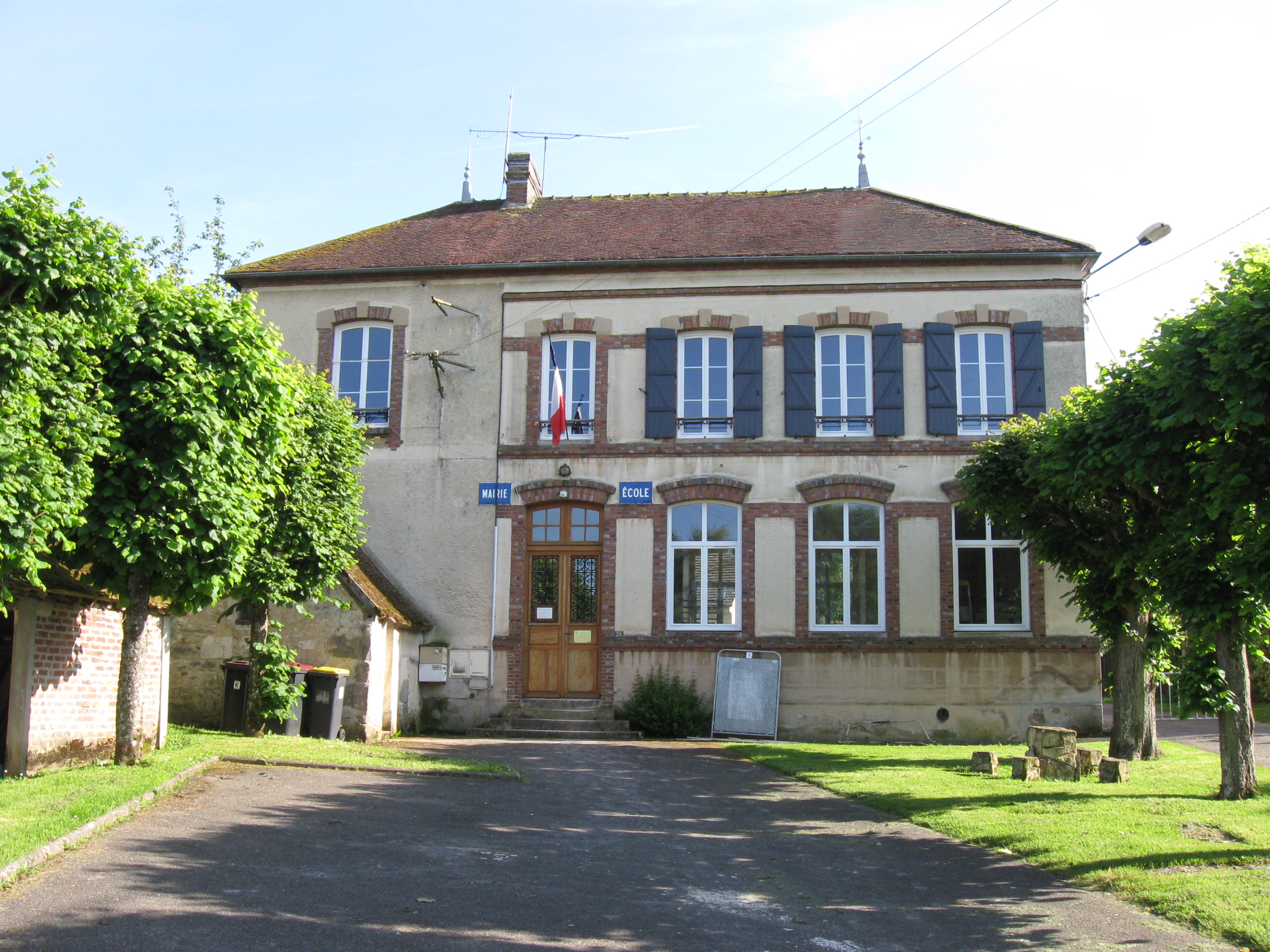 Mairie-école de Vieux-Champagne. (Seine-et-Marne, région Île-de-France).